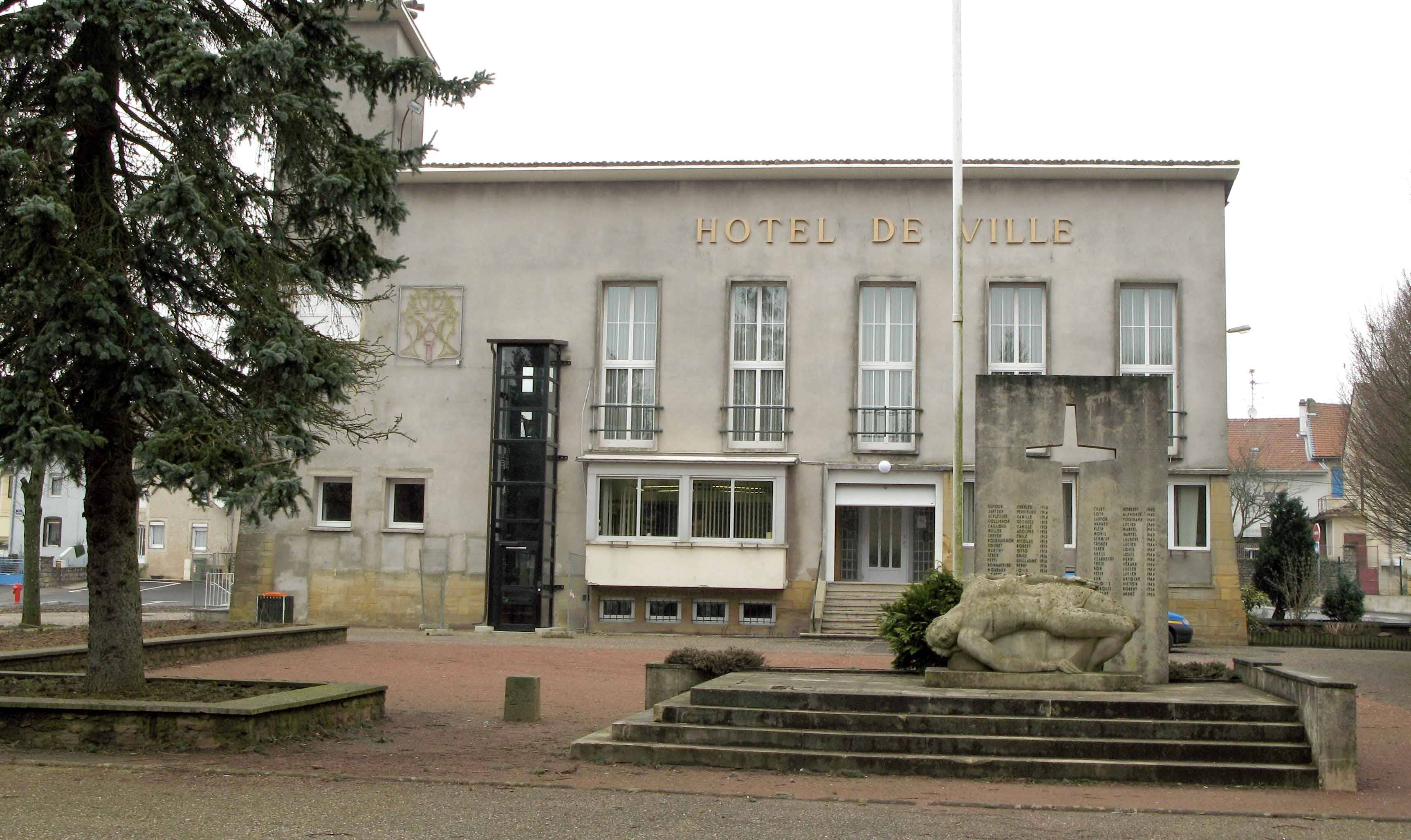 Aumetz Stadhaus